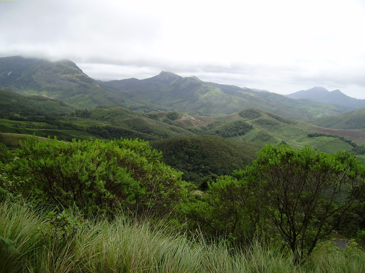 Eravikulam National Park, Munnar